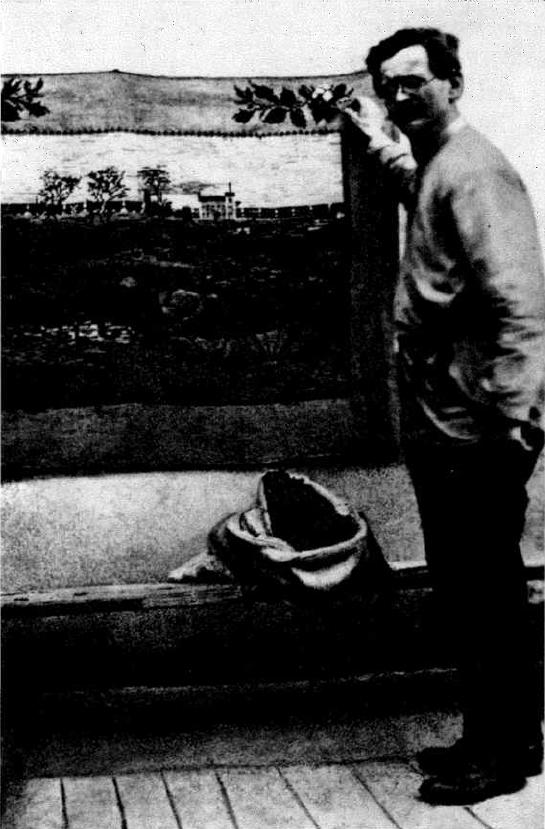 Беларуская (тарашкевіца): Беларускі паэт і перакладчык Альбэрт Паўловіч за вышыўкай уласнага дывана